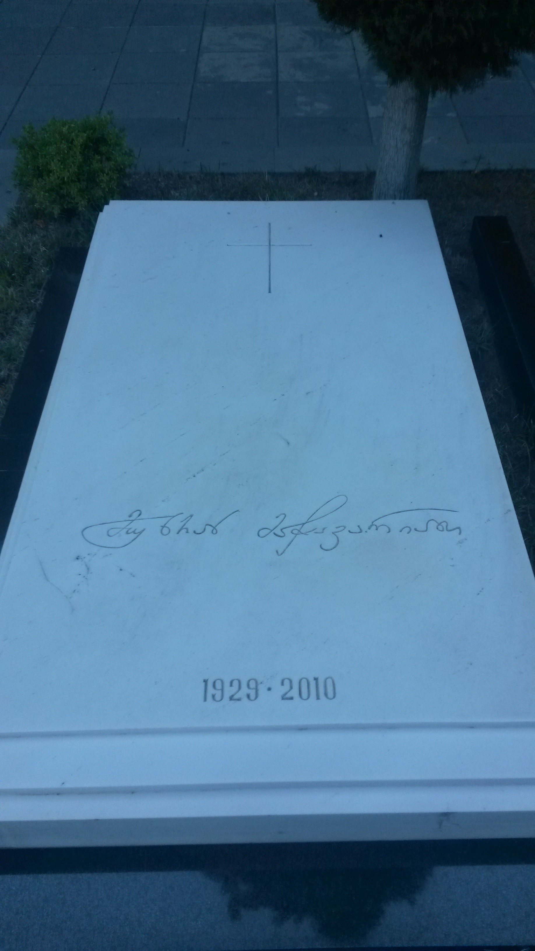 მუხრან მაჭავარიანი